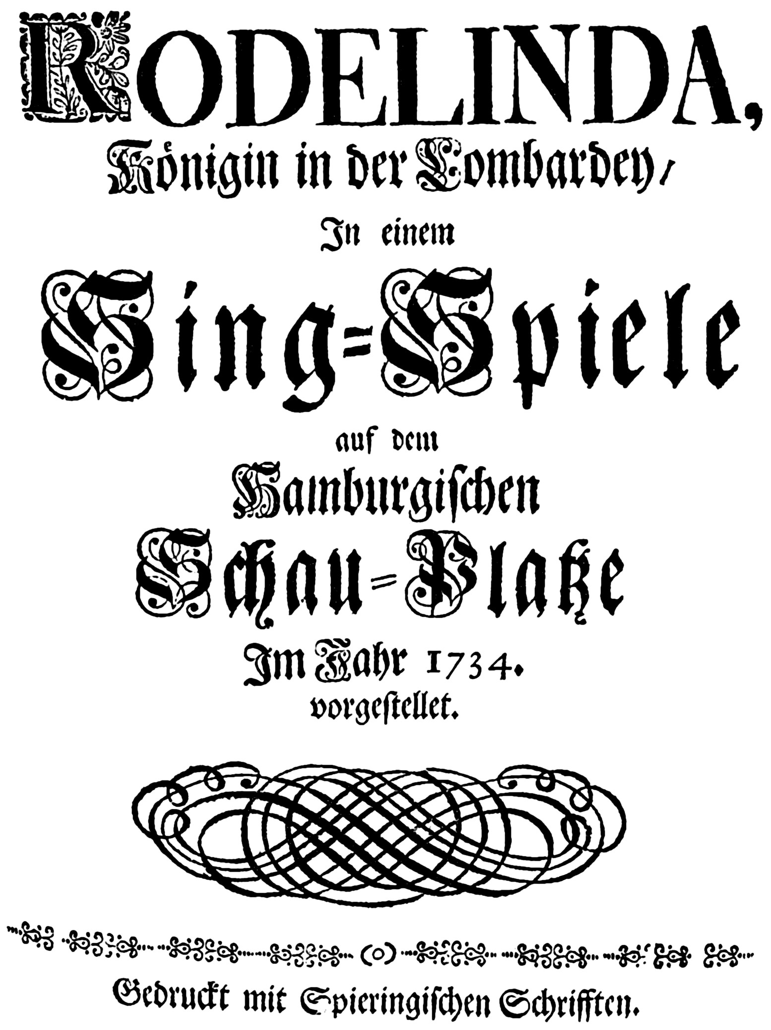 Titelseite des Hamburger Librettodruckes von 1734